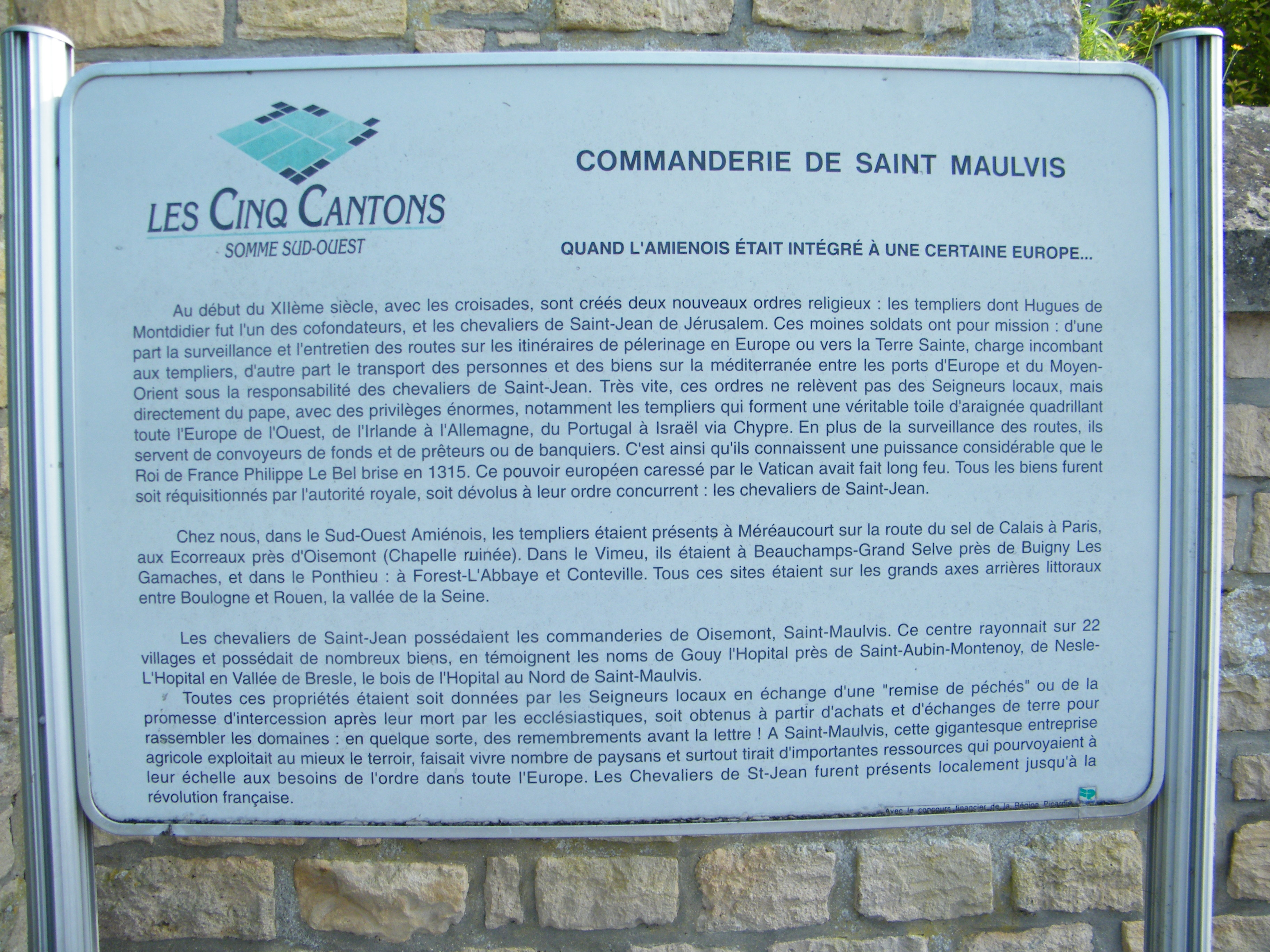 Saint-Maulvis, Somme, Fr, panneau d'informations, près de l'église.